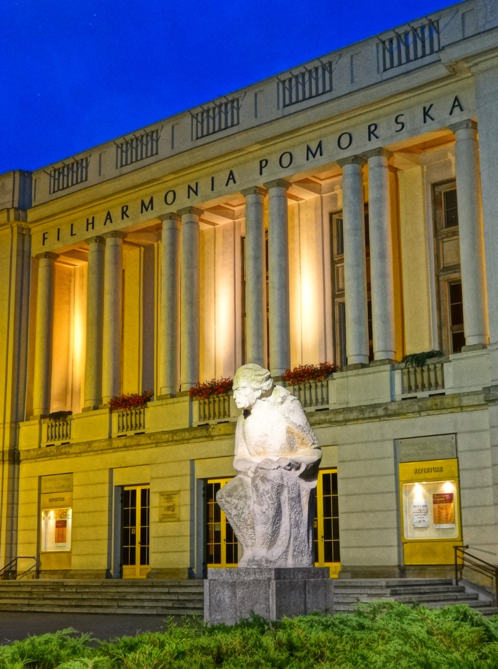 Rzeźba Ignacego Jana Paderewskiego stojąca przed frontem Filharmonii Pomorskiej w Bydgoszczy